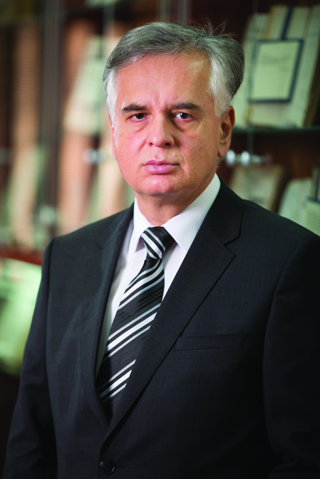 Српски (ћирилица): др Душан Николић